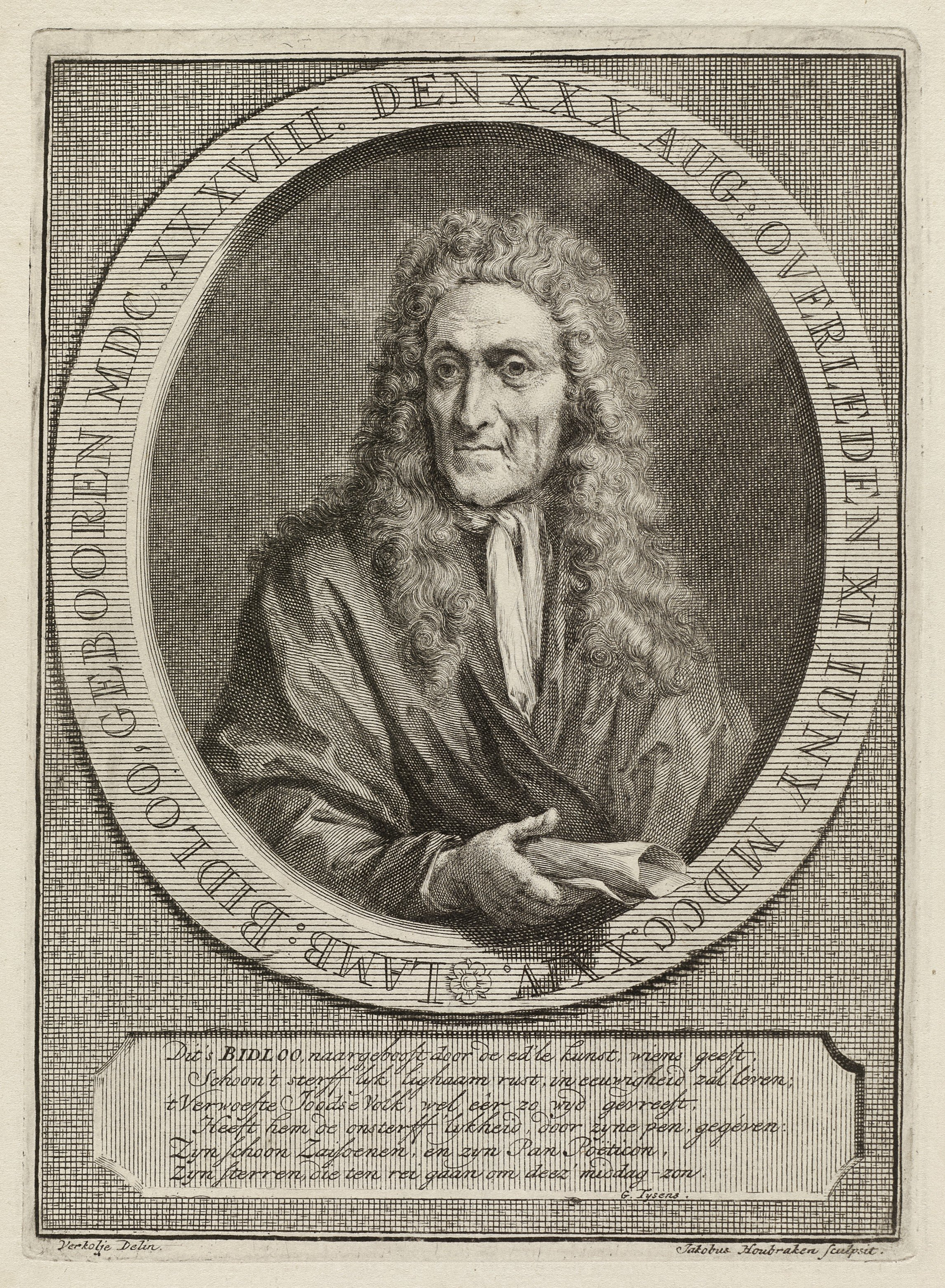 CollectieVoorhelm SchneevoogtInventarisnummerNL-HlmNHA_1477_53011320BeschrijvingPortret van Lambert Bidloo.Gravure door Jacob Houbraken naar ontwerptekening van Jan Verkolje (II) en Latijns onderschrift van Gysbert Tysens, gesigneerd.FotonummerNL-HlmNHA_1477_53011320DocumenttypePortrettenVervaardigerHoubraken, Jacob (1698-1780), Verkolje, Jan (II) (1683-1755), Tysens, Gysbert (1693-1732) PersonenBidloo, Lambert (1637-1724) Begindatum1708Einddatum1724TechniekGrafiek Drukwerk Trefwoordendichters en schrijvers, farmaceuten